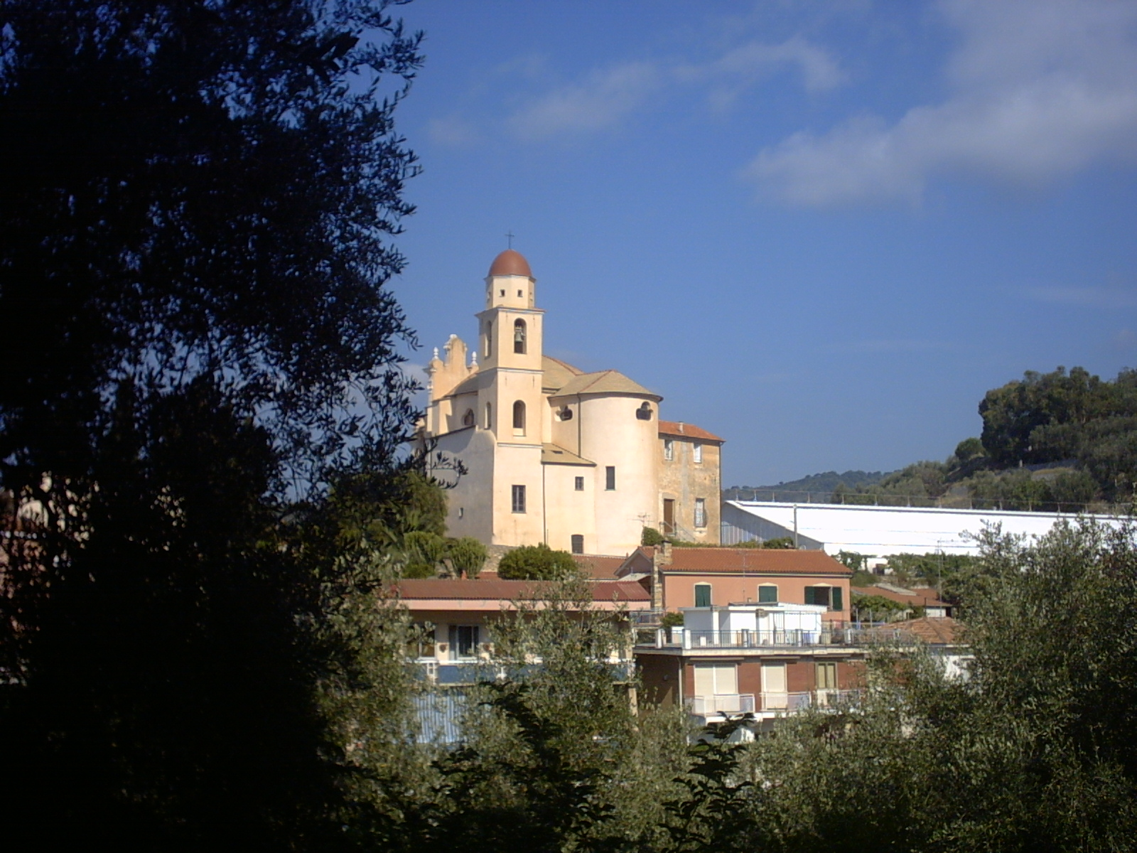 Chiesa di san Nicola da Tolentino a Cervo (Imperia)